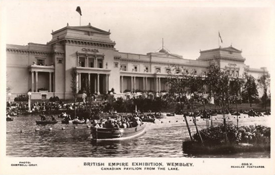 In Verbindung mit der Messe des britischen Kolonialreiches (British Empire Exhibition) veröffentlichte Ansichtskarte